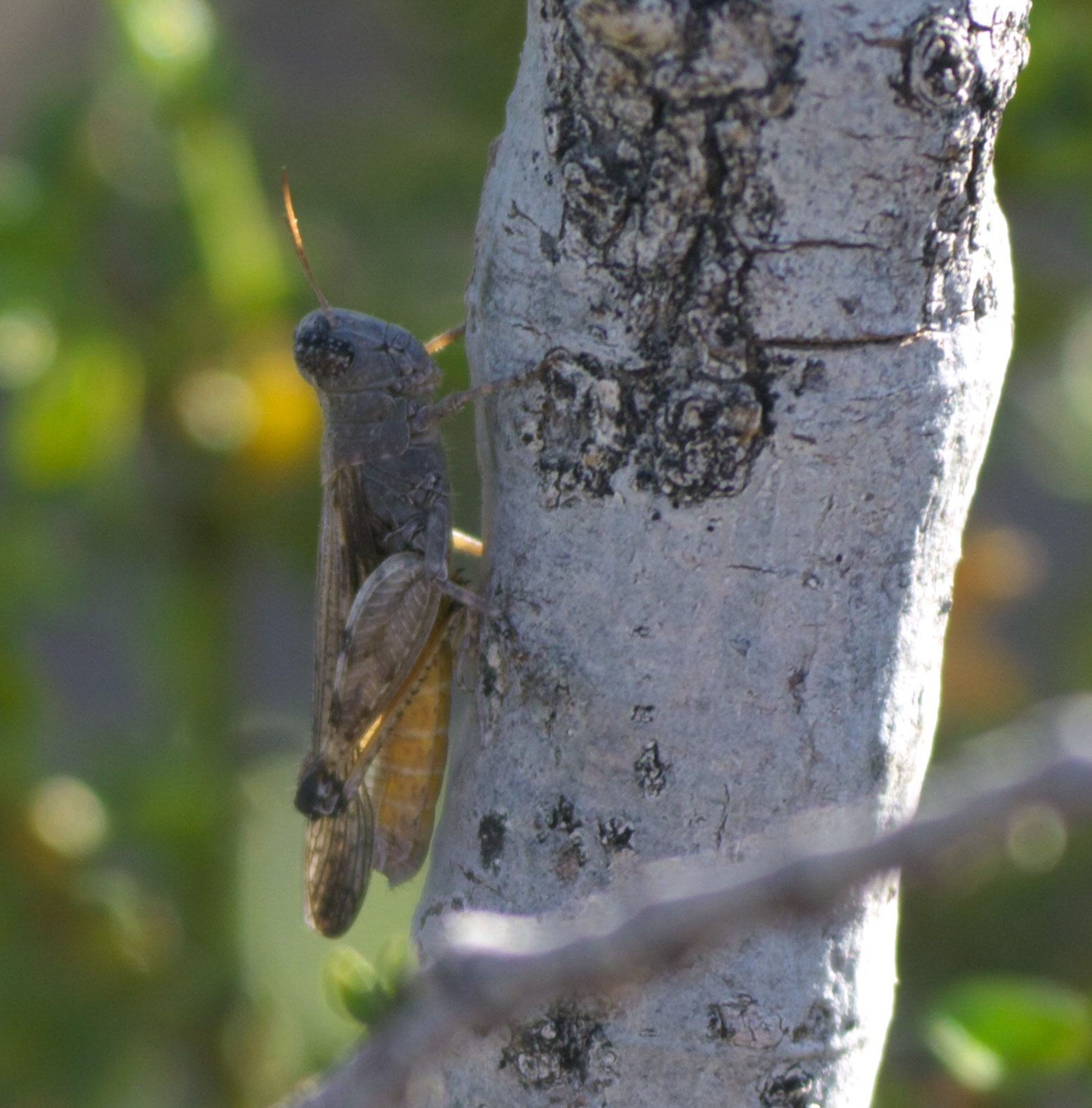 Ligurotettix coquilletti, Desert Clicker Grasshopper, ID Confidence: 98